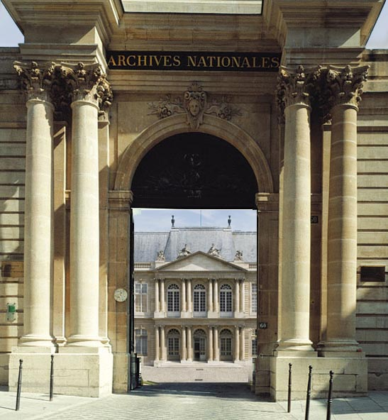 Entrée du site de Paris (hôtel de Soubise). Archives nationales (France)